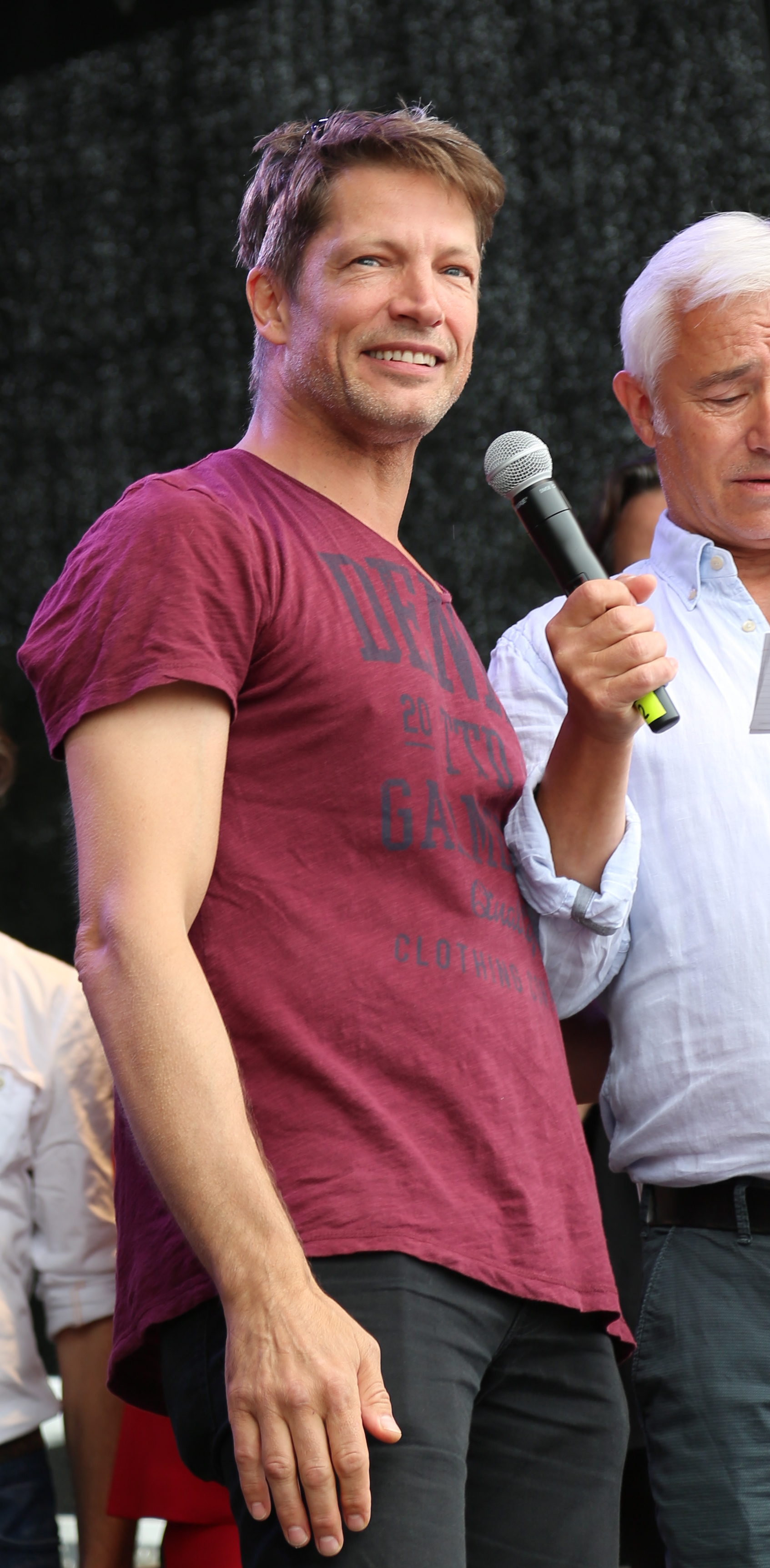 Mickey Hardt und Gerry Hungbauer beim "Rote Rosen"-Fantag 2017, am 18.06.2017 in Lüneburg.